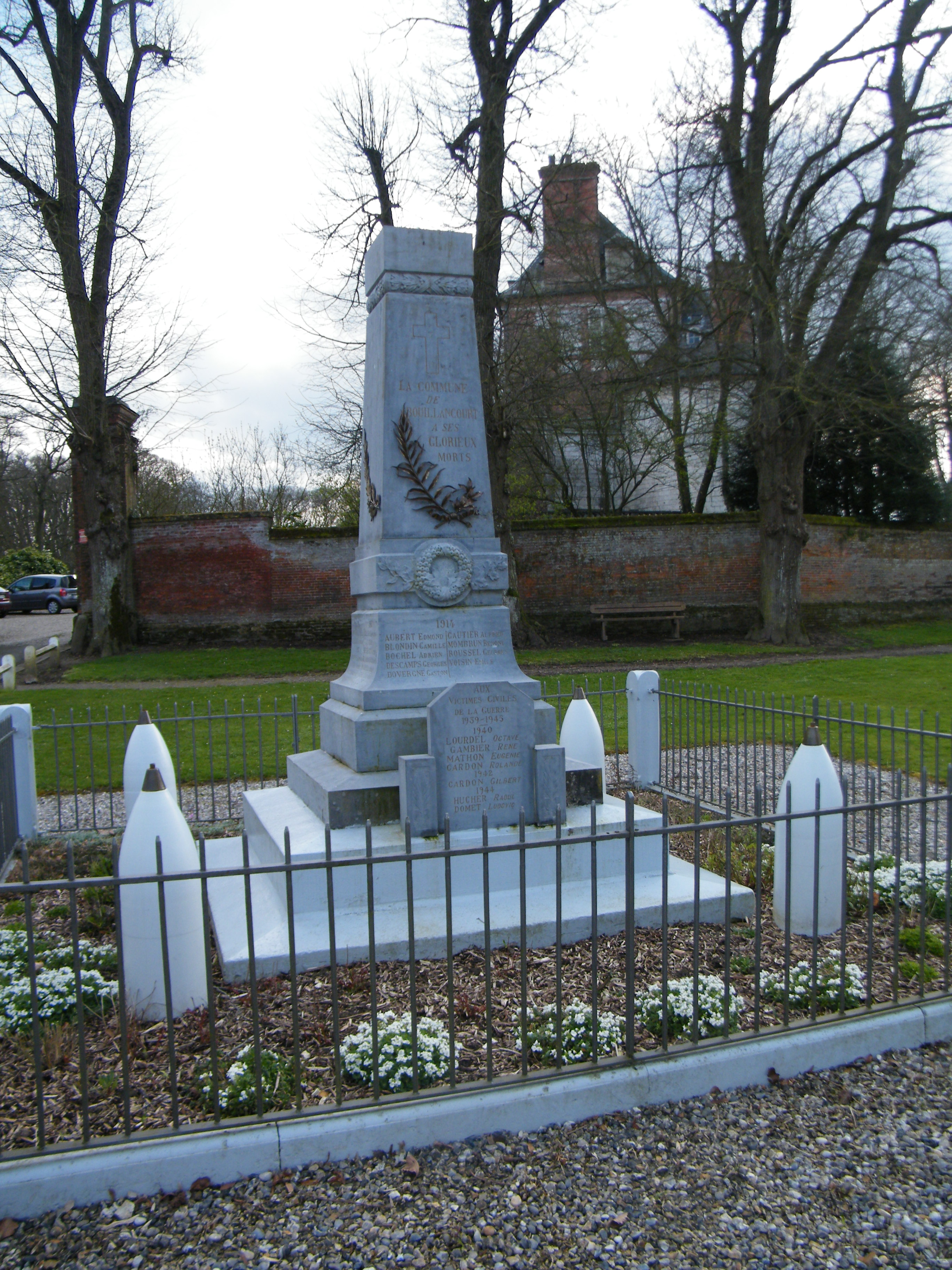 Le monument aux morts pour la patrie.